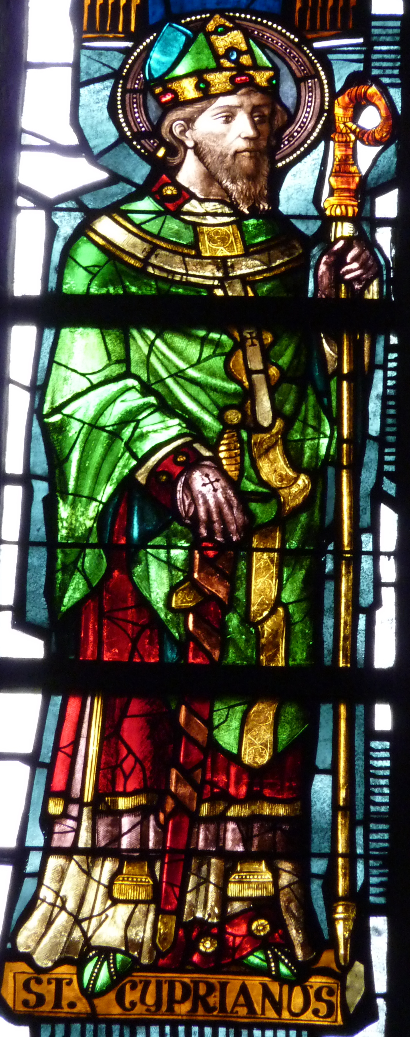 Bleiglasfenster in der Abtei Kornelimünster, Darstellung: hl. Cyprian von Karthago